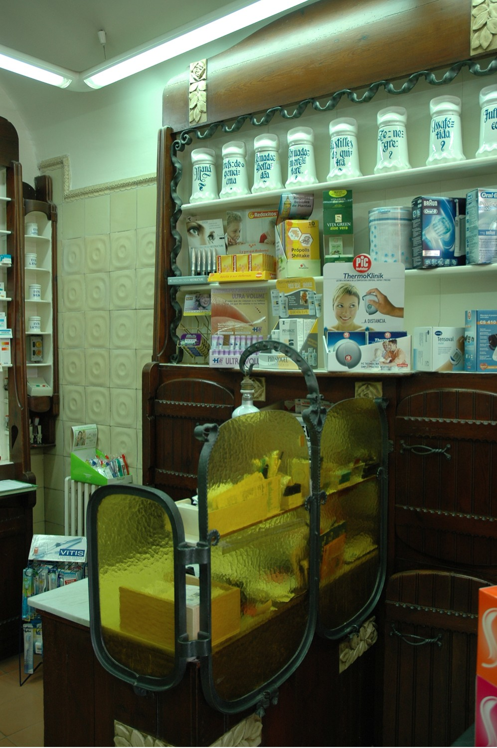 Farmàcia Masó a Girona, Espanya.